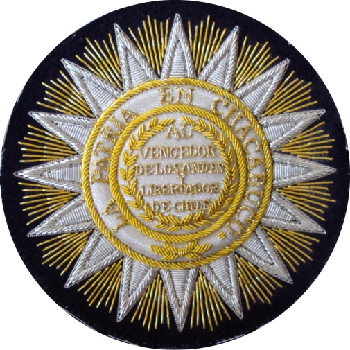 Réplica bordada a mano de la condecoración otorgada al General San Martín por la victoria en la batalla de Chacabuco